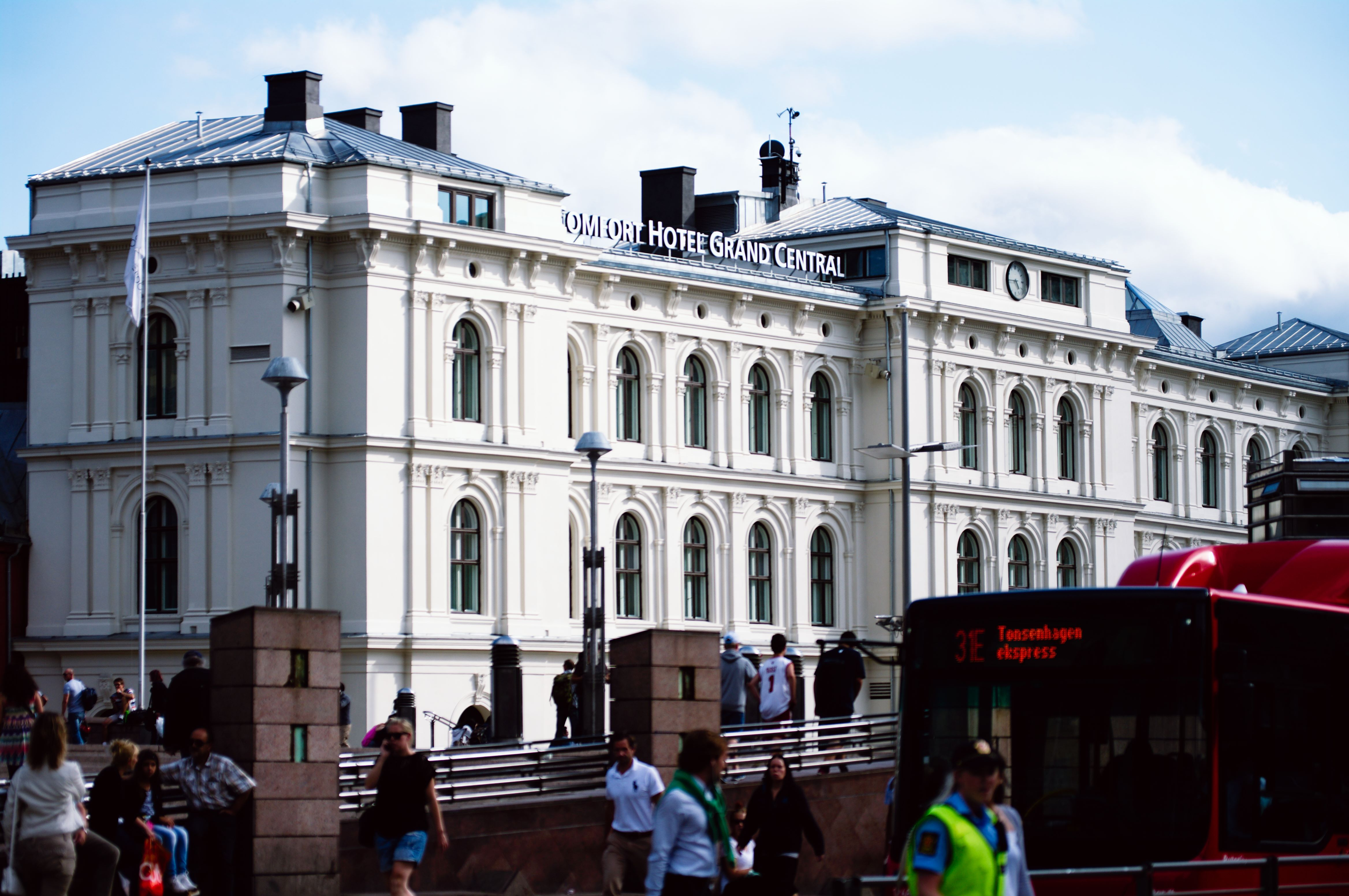 Oslo østbanestasjon.